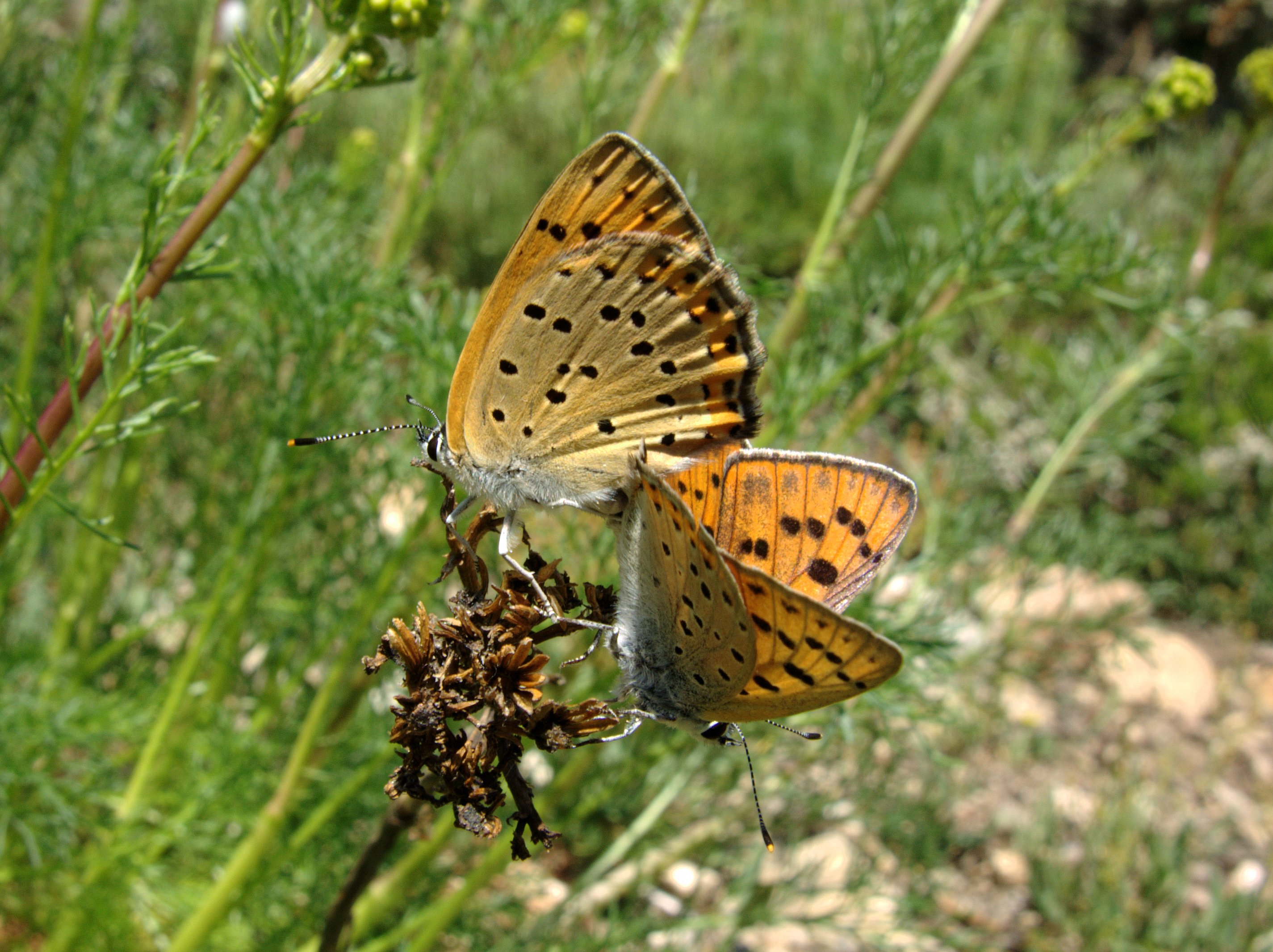 Lycaena alciphron (Lycaenidae). Cercedilla, Madrid, España.